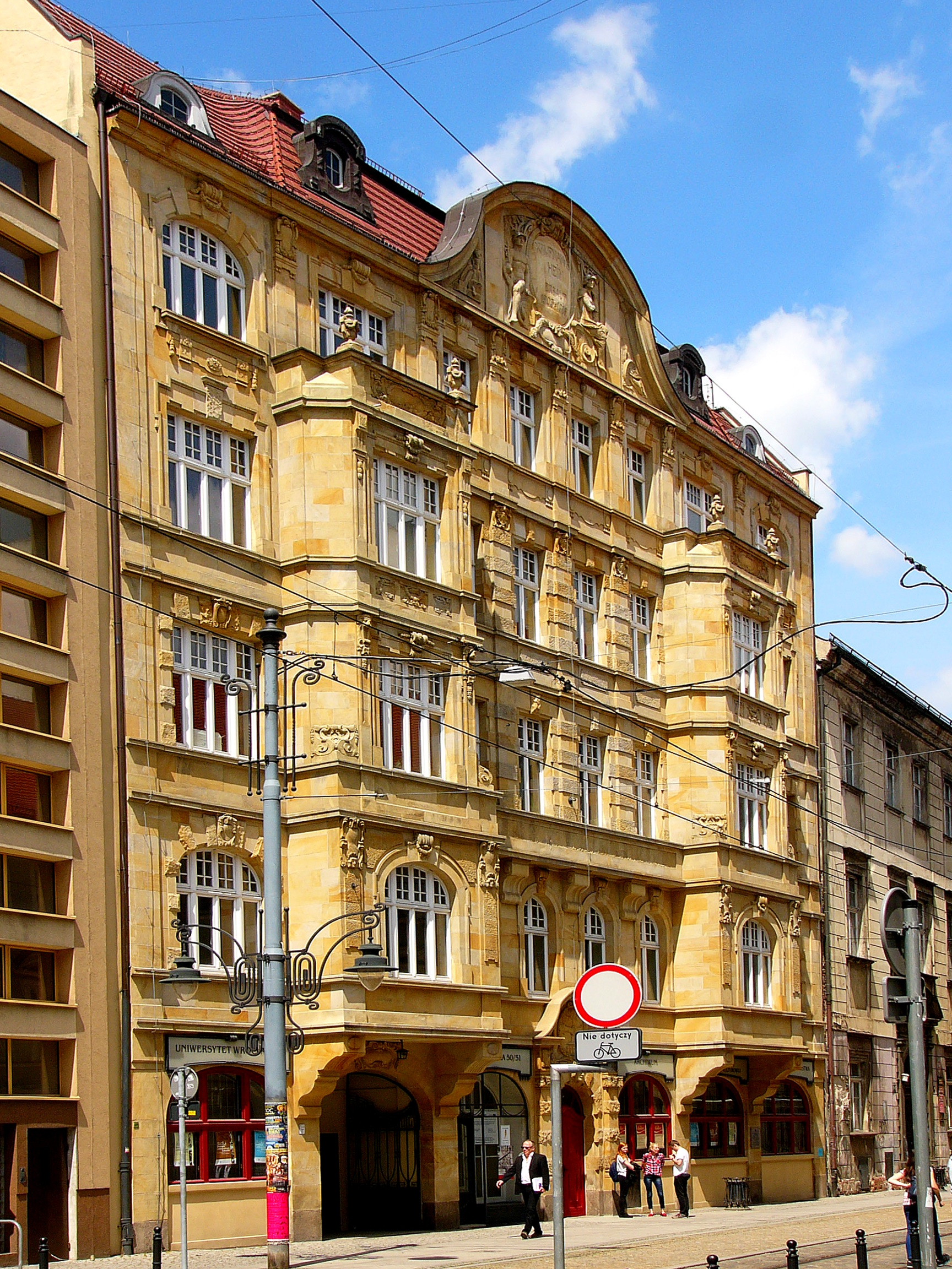 Wrocław, kamienica (z oficyną), 1905